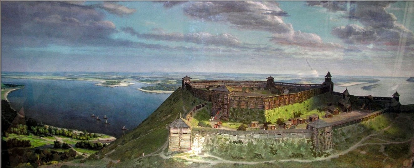 Фото реконструкції літописного міста Чучин Художник - М.Казанський. Консультант - археолог В.Гончаров